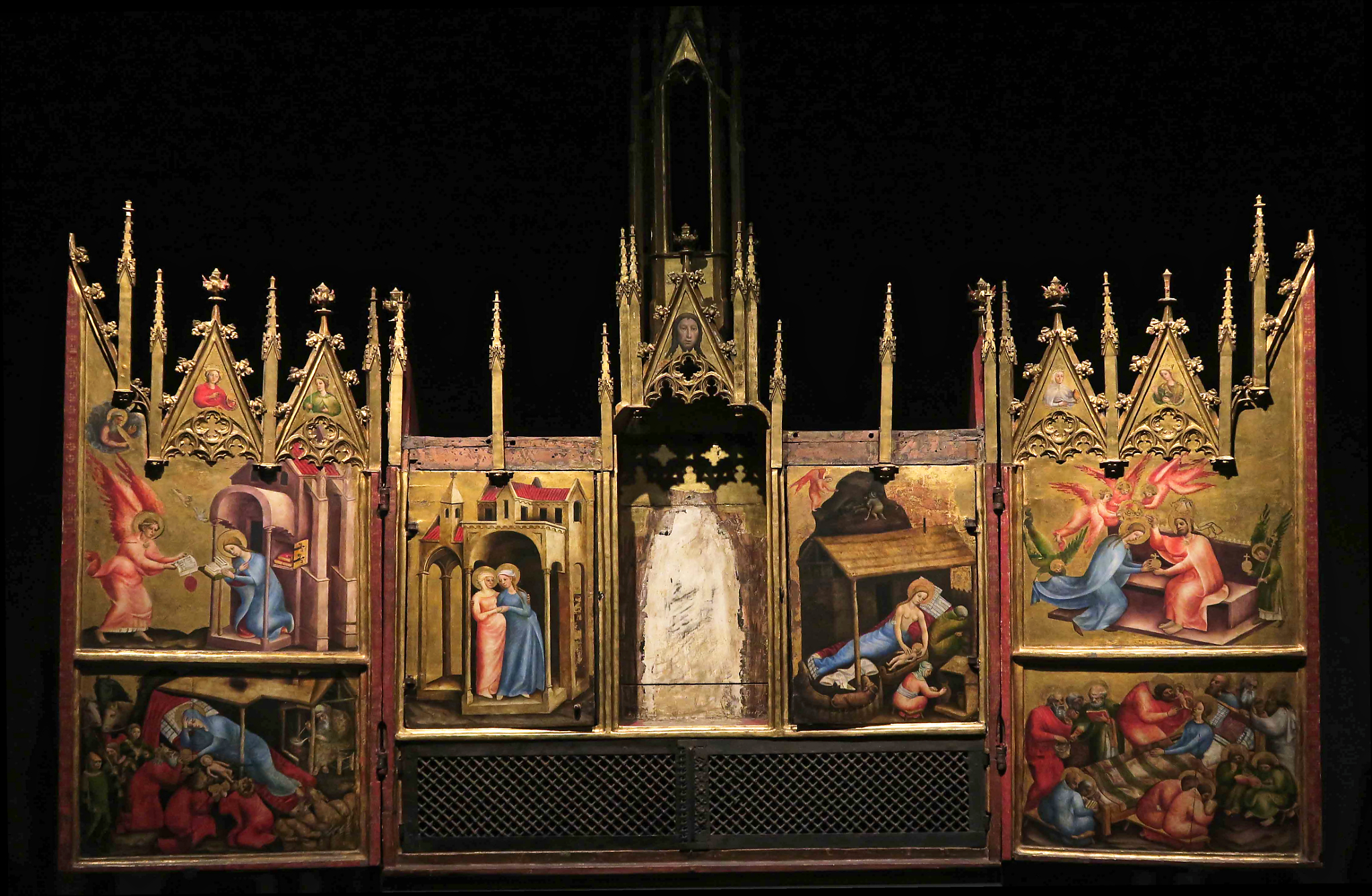 Altar von Schloss Tirol: Der älteste vollständig erhaltene Flügelaltar des Alpenraums, frühes Sammlungsstück des Ferdinandeums. Der Altar wird restauriert, ein Projekt, das bis 2020 laufen soll.